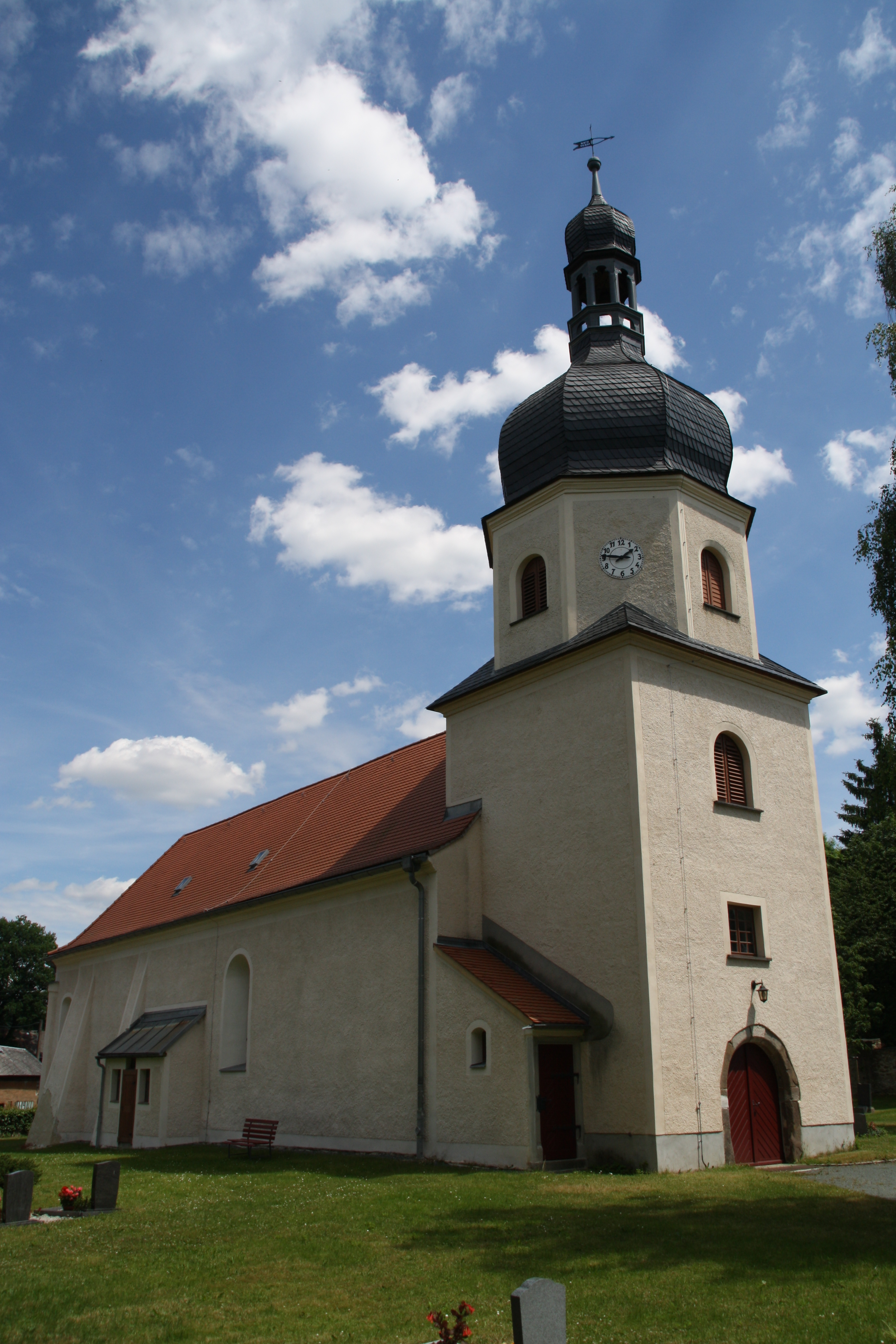 Kirche Taltitz